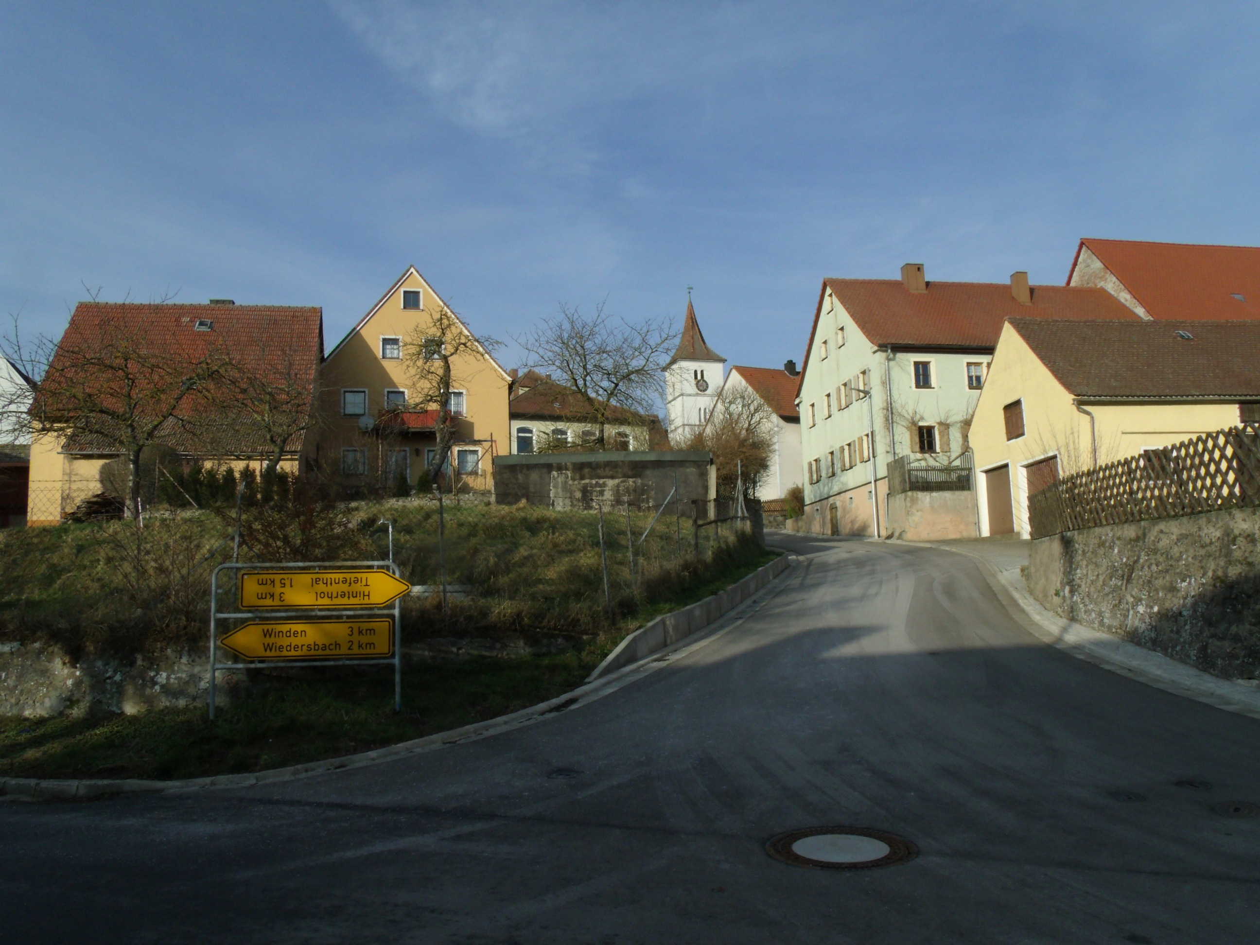 Neunkirchen, Ortsteil von Leutershausen im Landkreis Ansbach, Ortsmitte